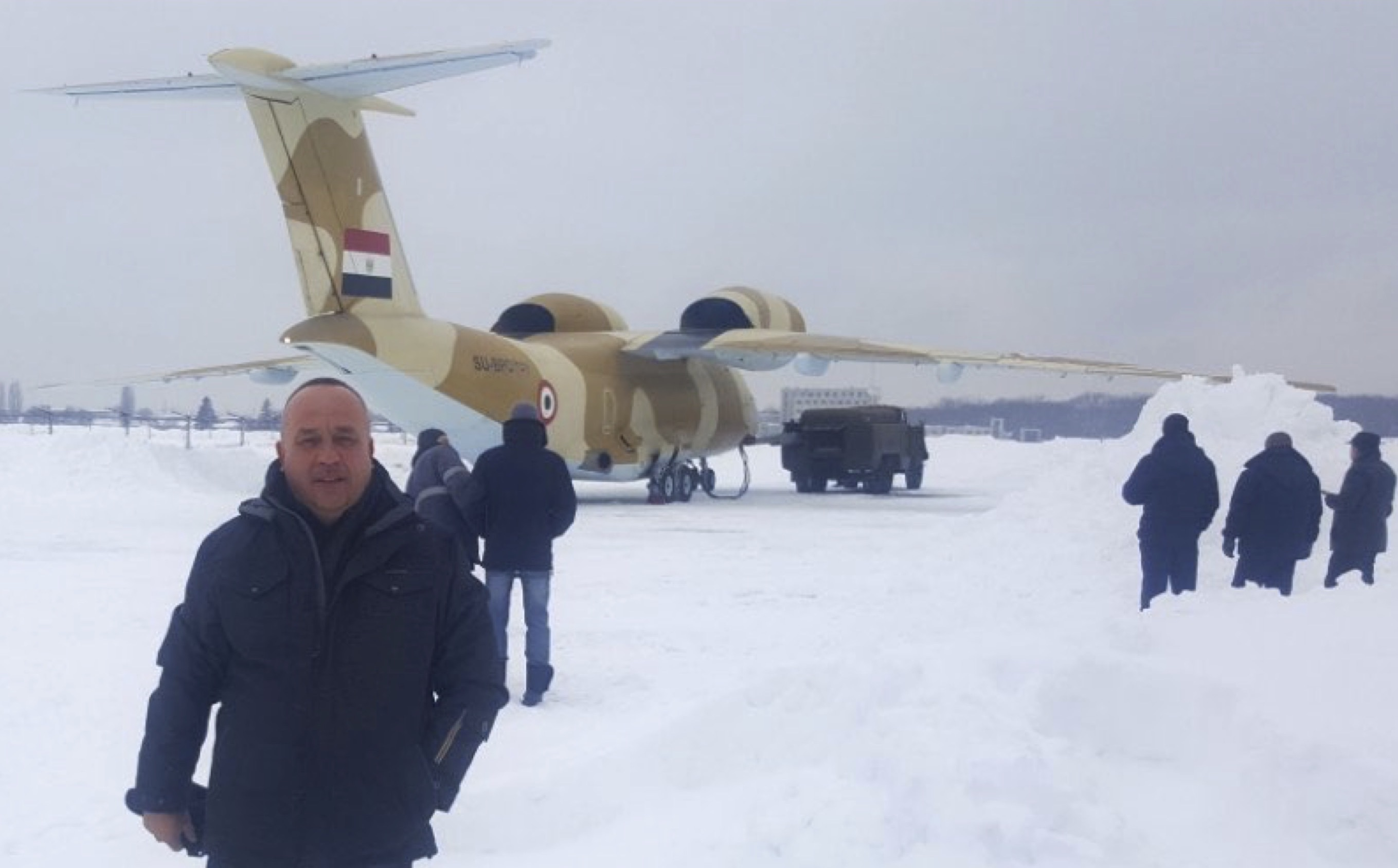 Відліт літака Ан-74Т-200А в Каїр